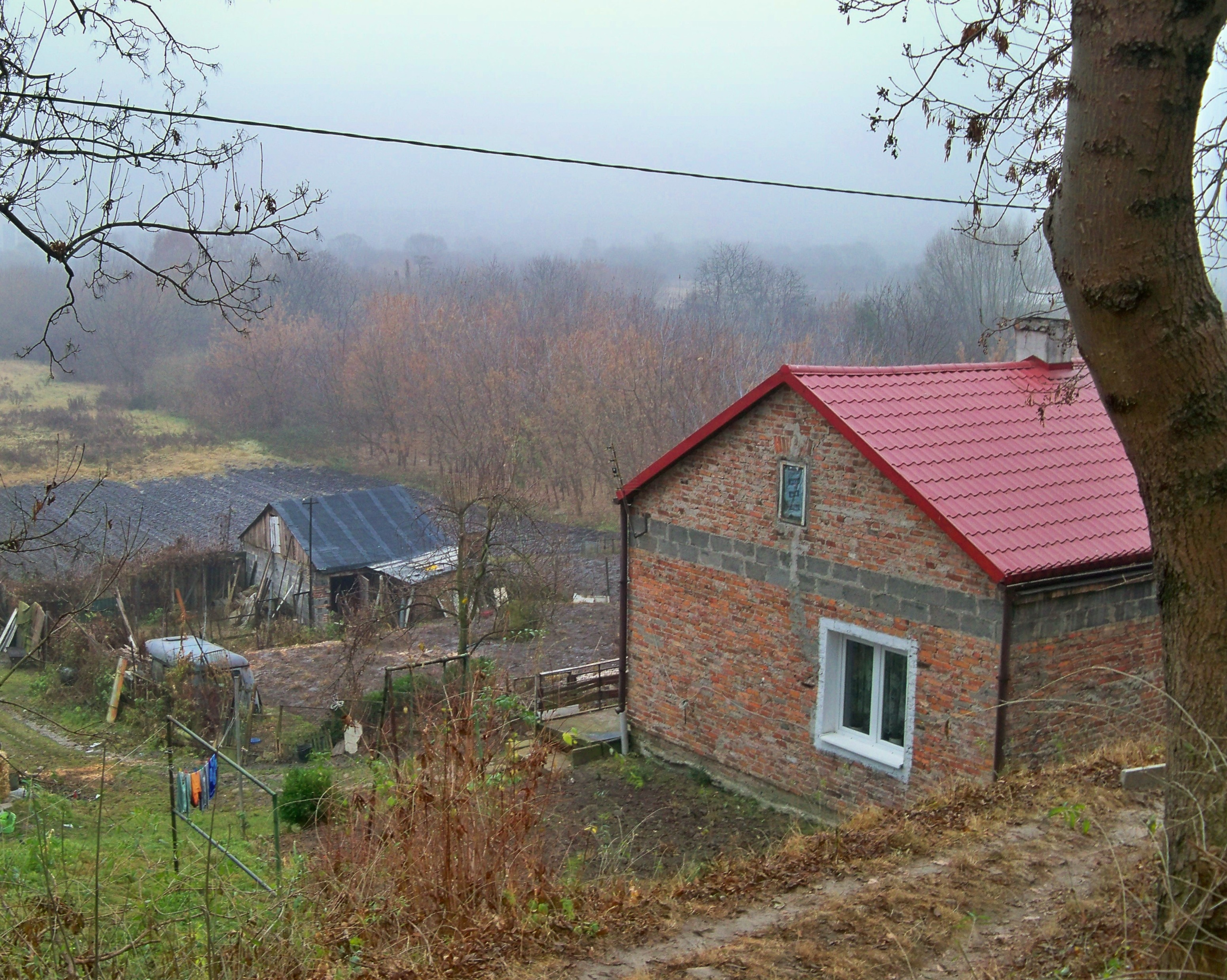 Widok ze skarpy warszawskiej na Szopy Polskie (ul. Bocheńska)